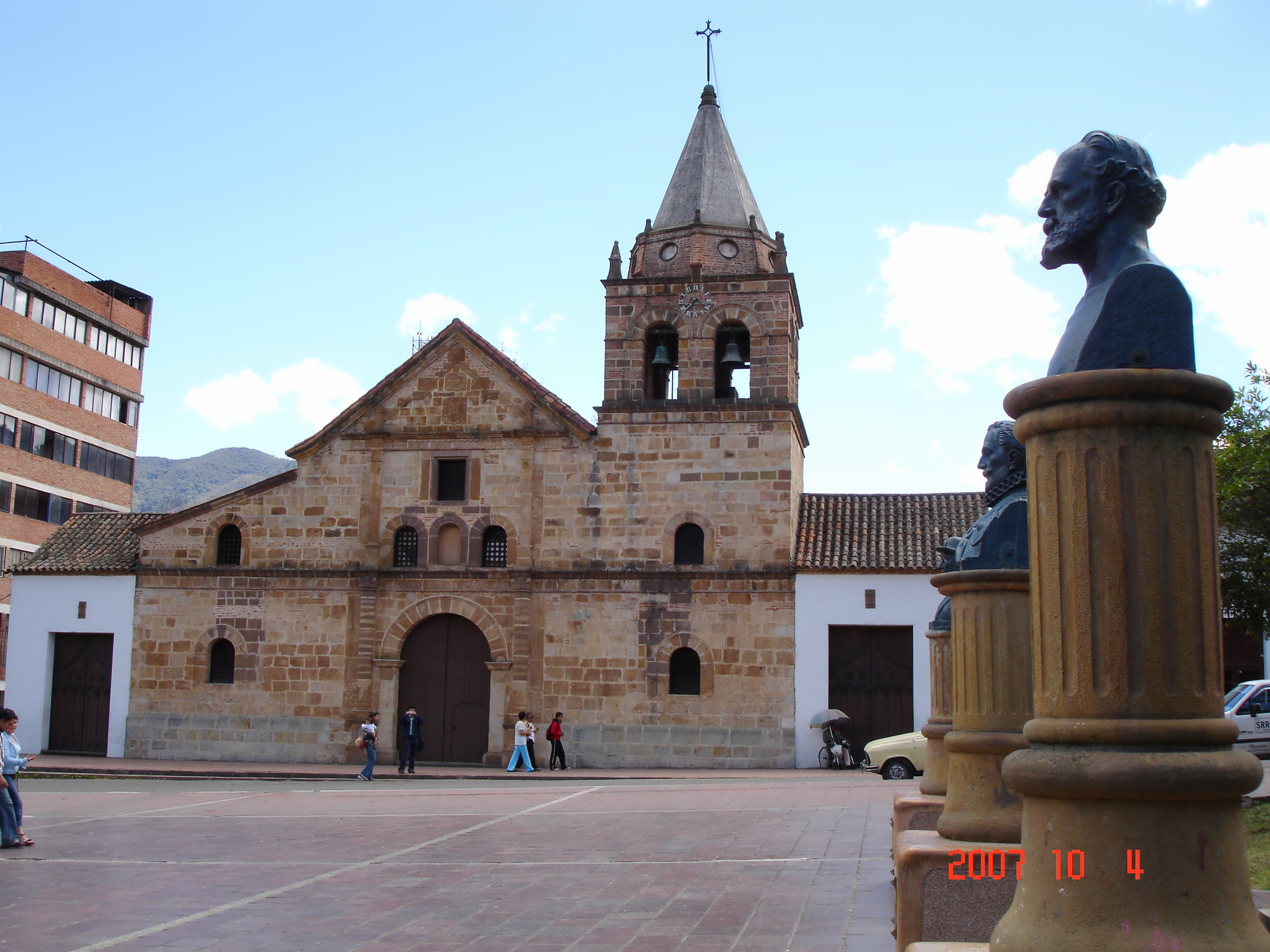 Sector Antiguo de la Ciudad de Pamplona